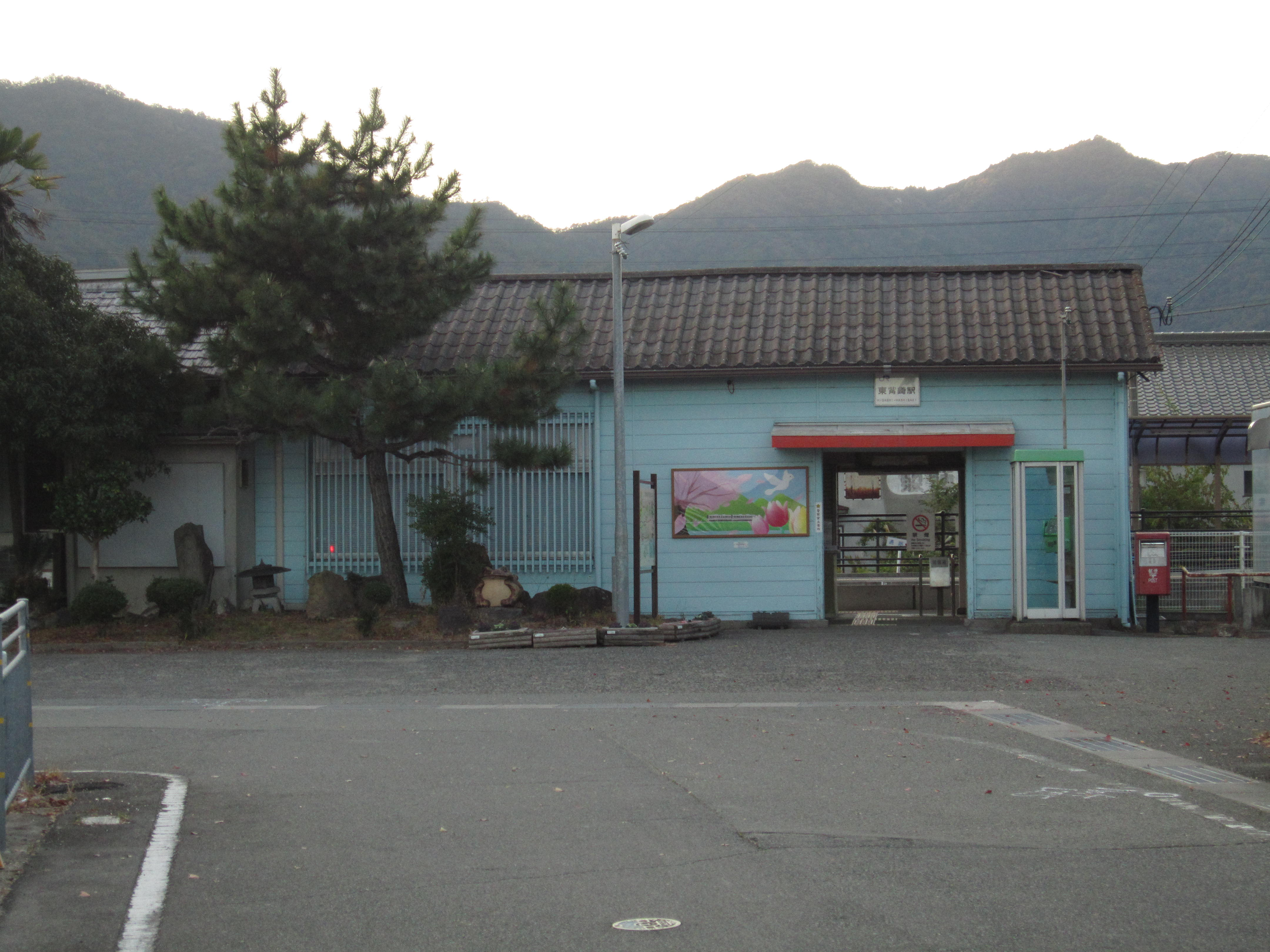 ホームの東側にある東觜崎駅駅舎。